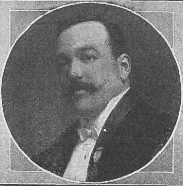 Fotografía del director del Orfeón Donostiarra y compositor español Secundino Esnaola Berrondo publicada en 1912